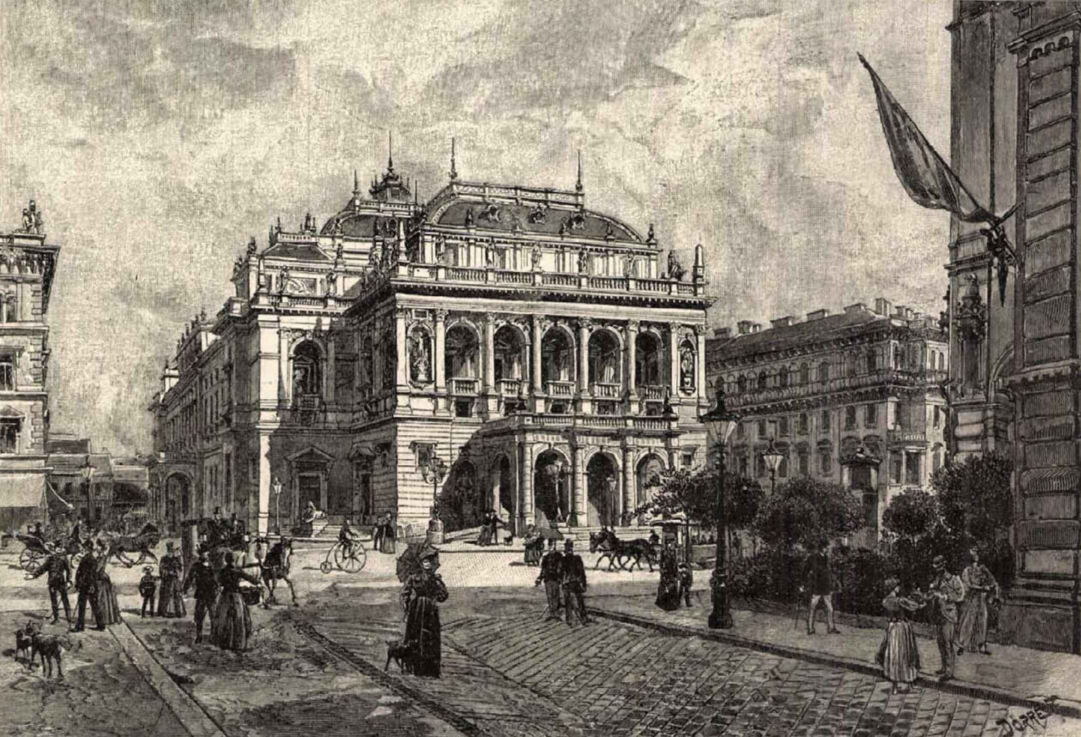 Operaház VASÁRNAPI UJSÁG 1894. 40. SZÁM BUDAPEST, OKTÓBER 7.